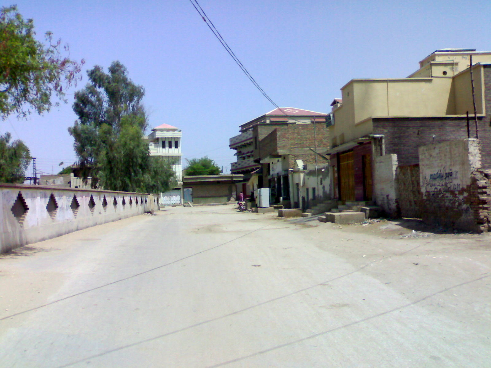 Dādu, Pakistan